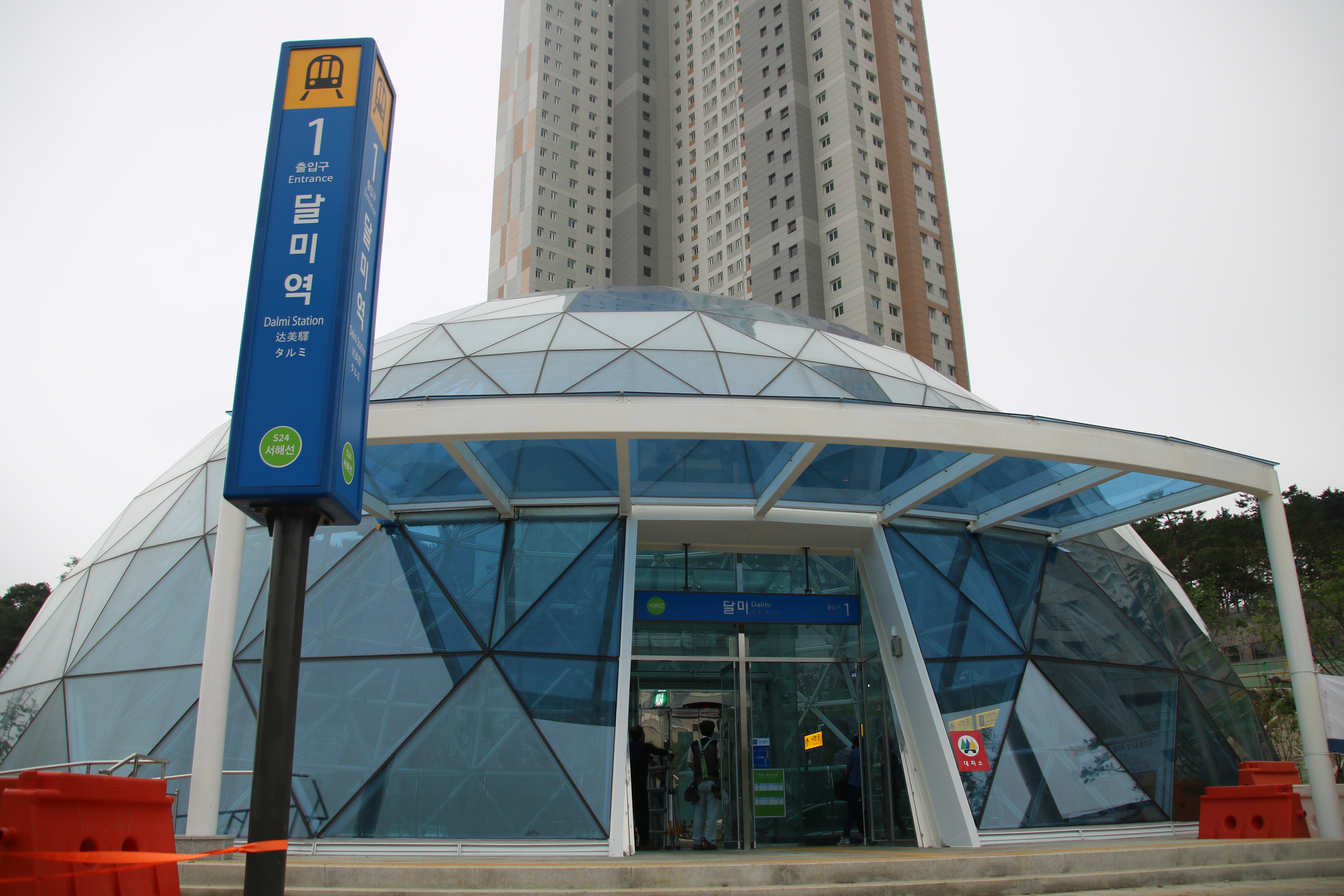 달미역 1번 출입구